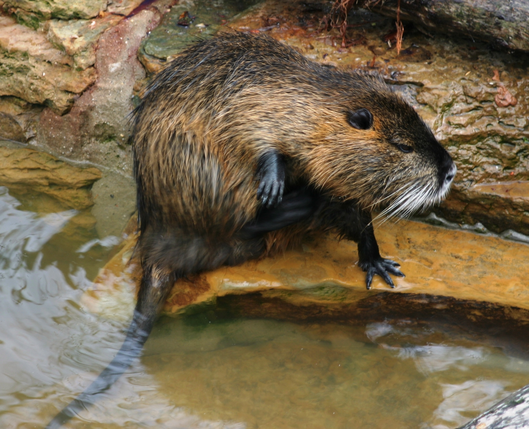 Eng Bisamrat bei der Botz.